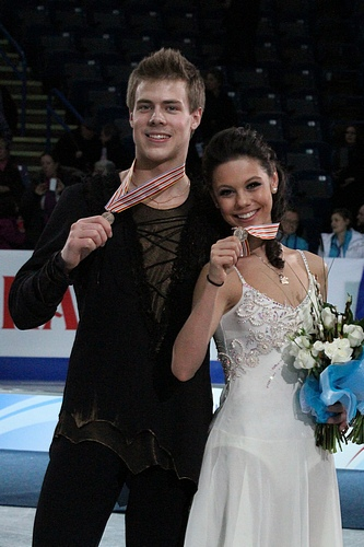 Елена Ильиных и Никита Кацалапов на чемпионате Европы по фигурному катанию 2012